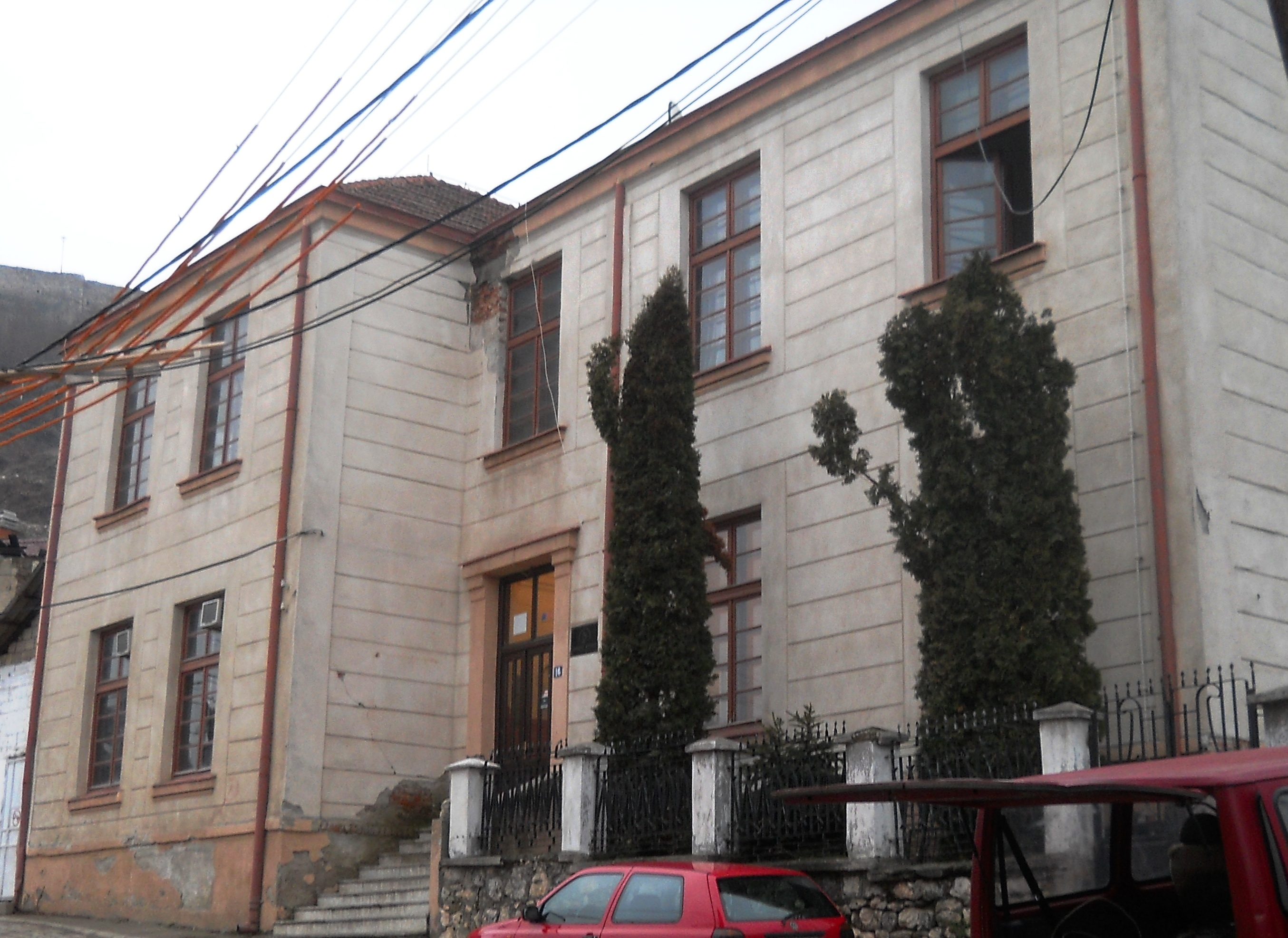 Ndërtesa e shkollës së mesme të muzikës në Prizren